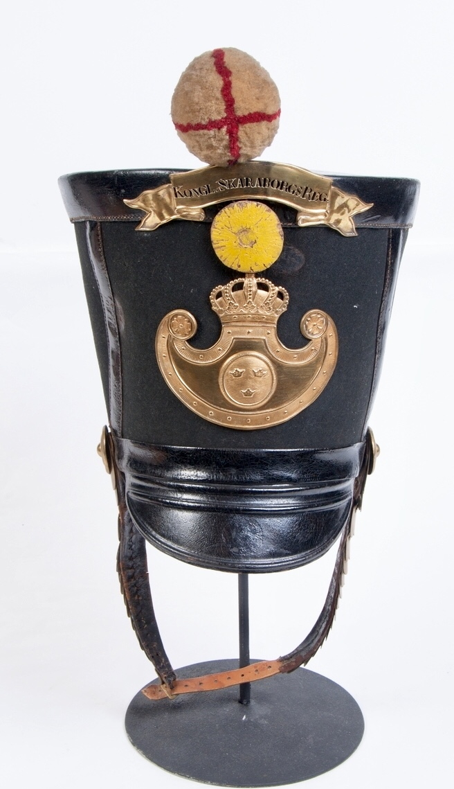 Tillhör Armémuseums samlingar.